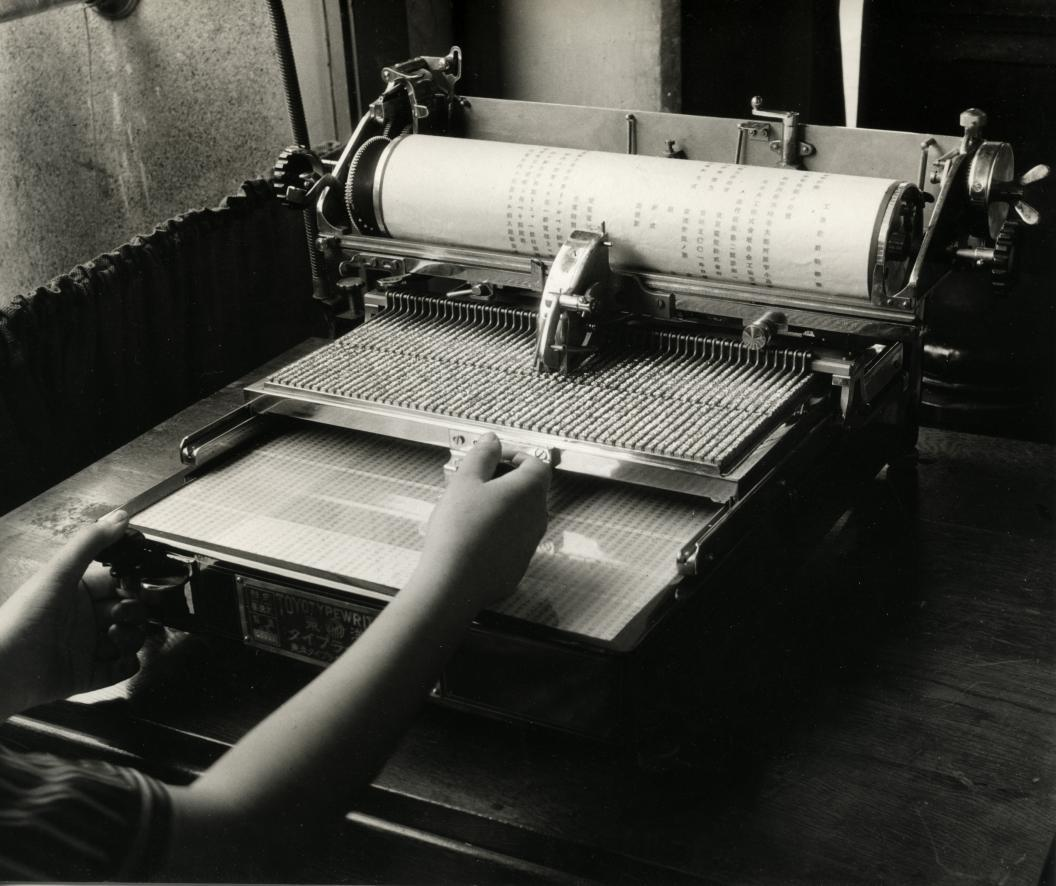 Spaarnestad Photo, SFA022807479 Japanse schrijfmachine: de typiste moet het letterbord met losliggende karakters in de juiste positie brengen, om het juiste karakter te kunnen aanslaan. 1938. Collectie SPAARNESTAD PHOTO/Het Leven Japanese typewriter: a panel (type case) with characters lying loose must be brought in the right position before the character can be typed. 1938. Voor meer informatie en voor meer foto’s uit de collectie van Spaarnestad Photo, bezoek onze Beeldbank: U kunt ons helpen onze kennis van de fotocollecties te verrijken door tags en commentaren toe te voegen. Herkent u mensen of locaties of heeft u een bijzonder verhaal te vertellen bij één van de foto’s, laat dan een reactie achter (als u ingelogd bent bij Flickr) of stuur een mailtje naar: You can help us gain more knowledge on the content of our collection by simply adding a comment with information. If you do not wish to log in, you can write an e-mail to